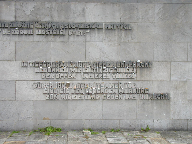 Gedenkstätte Bergen-Belsen: Inschrift für die ermordeten Sinti auf der Inschriftenwand.